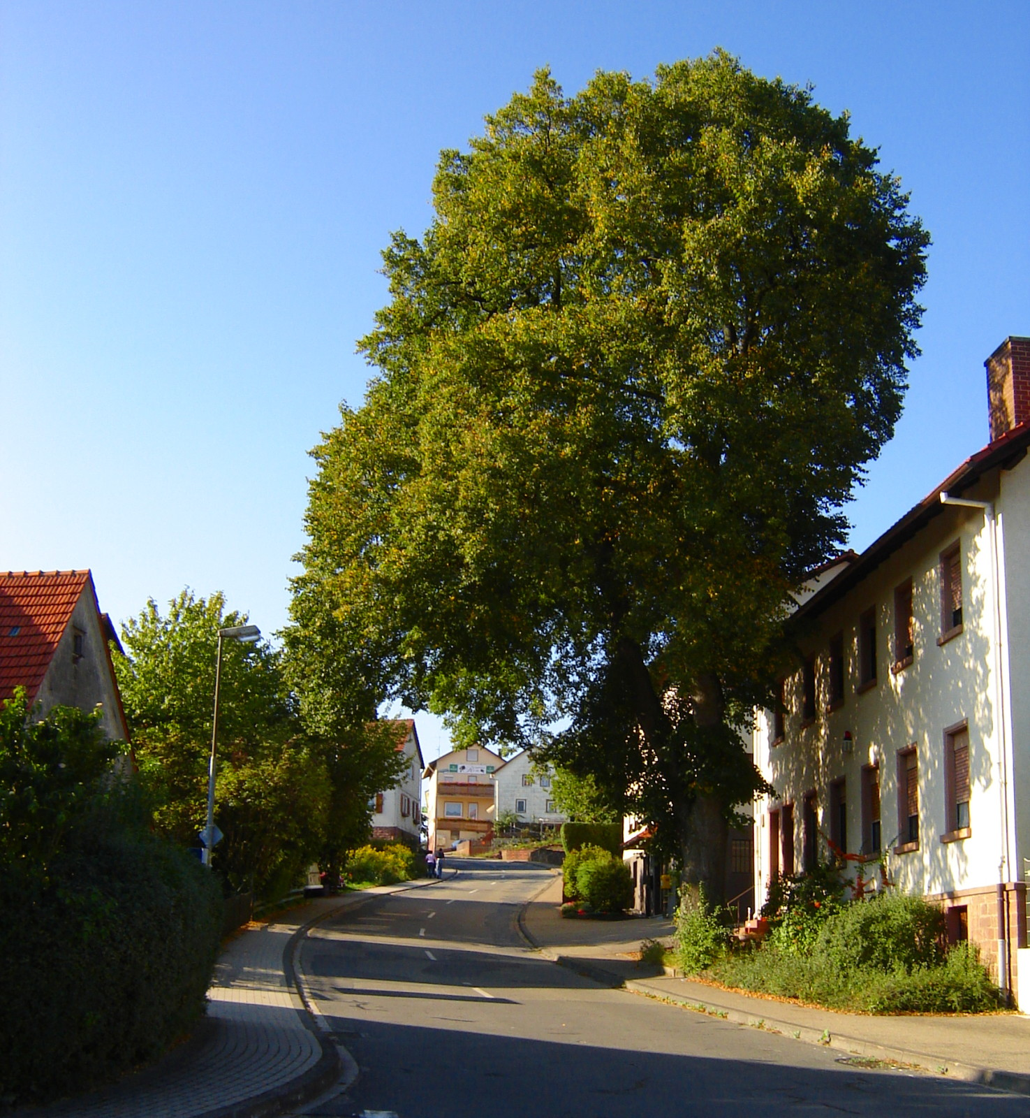 Impression vom Ortsteil Weisbach